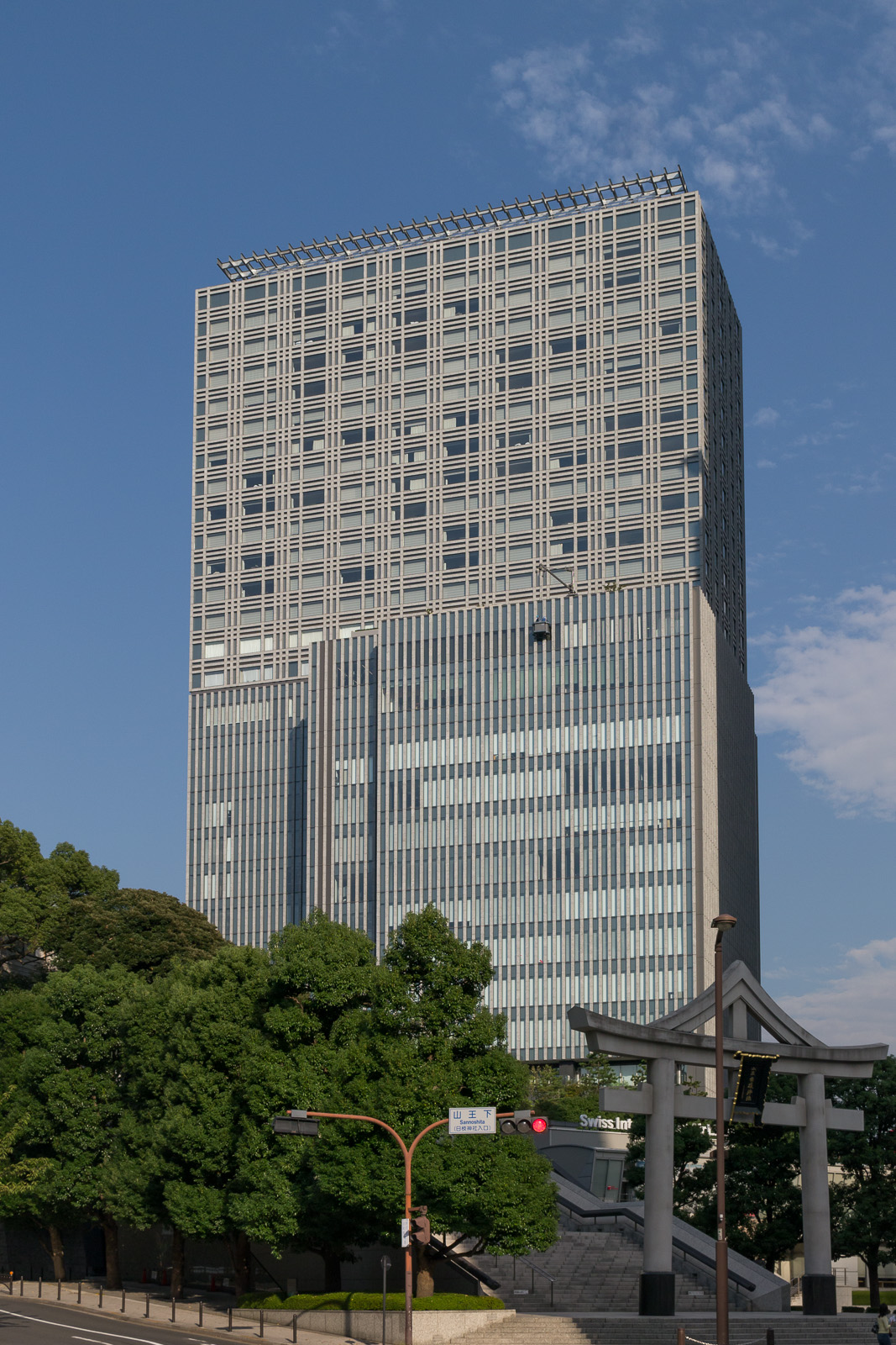 東急キャピトルタワー（ザ・キャピトルホテル東急）、東京都千代田区永田町2丁目。